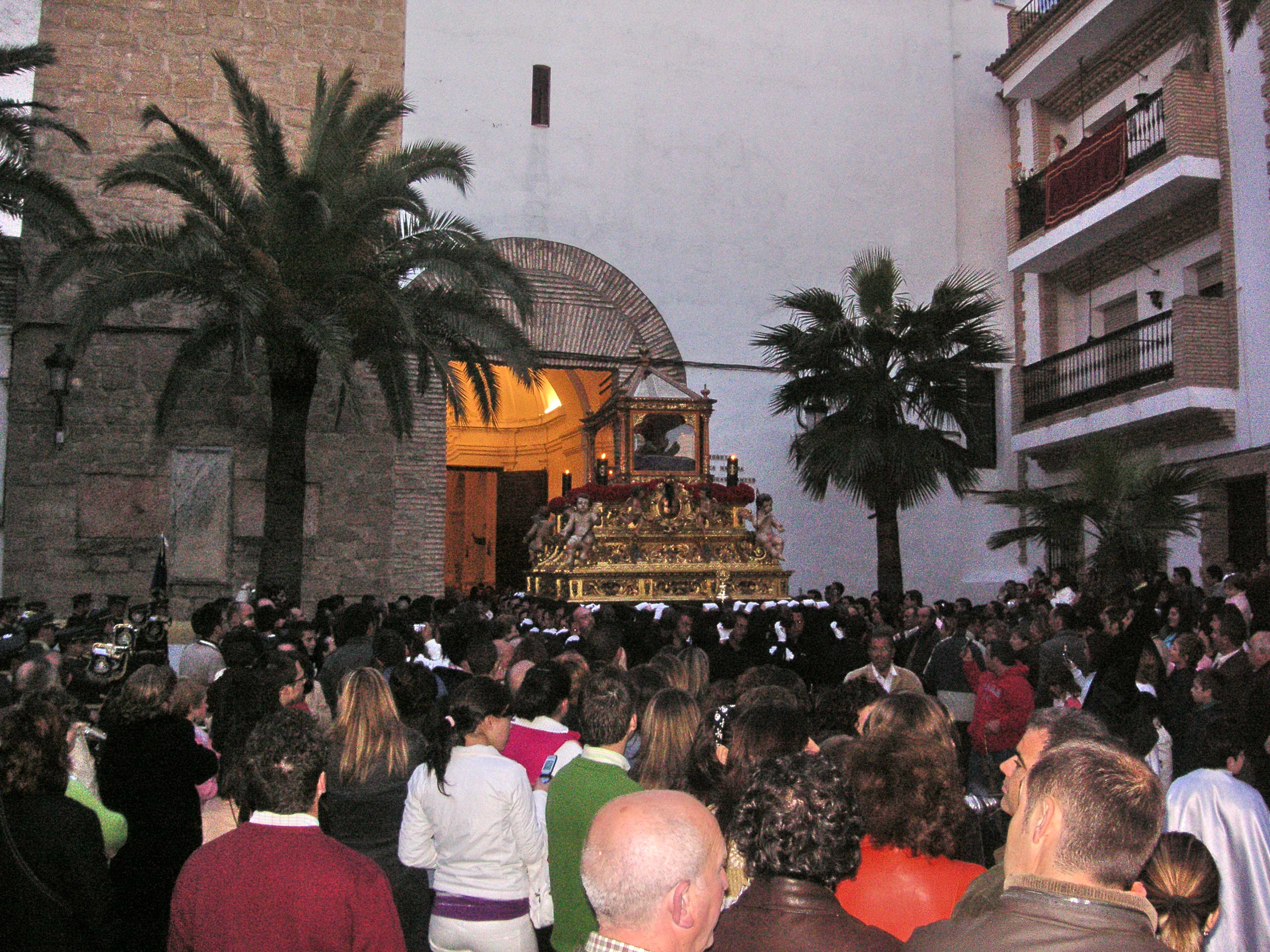 Fernán Núñez (Córdoba): Iglesia de Santa Marina. Semana Santa